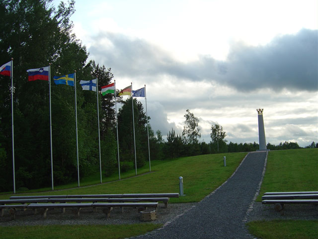 Foto på monumentet över Europas centrum i Litauen, tagen av mig själv.